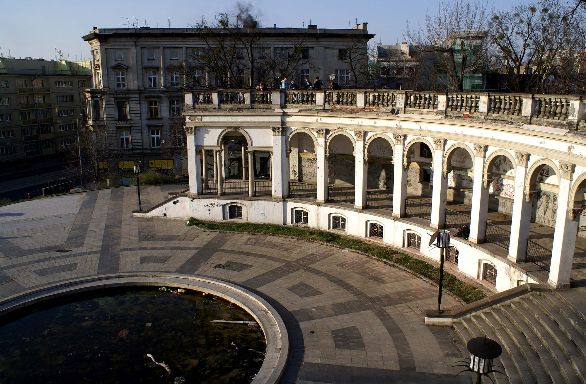 Wrocław, Bastion Sakwowy, tzw. Wzgórze Partyzantów, XIV, XVI, XIX